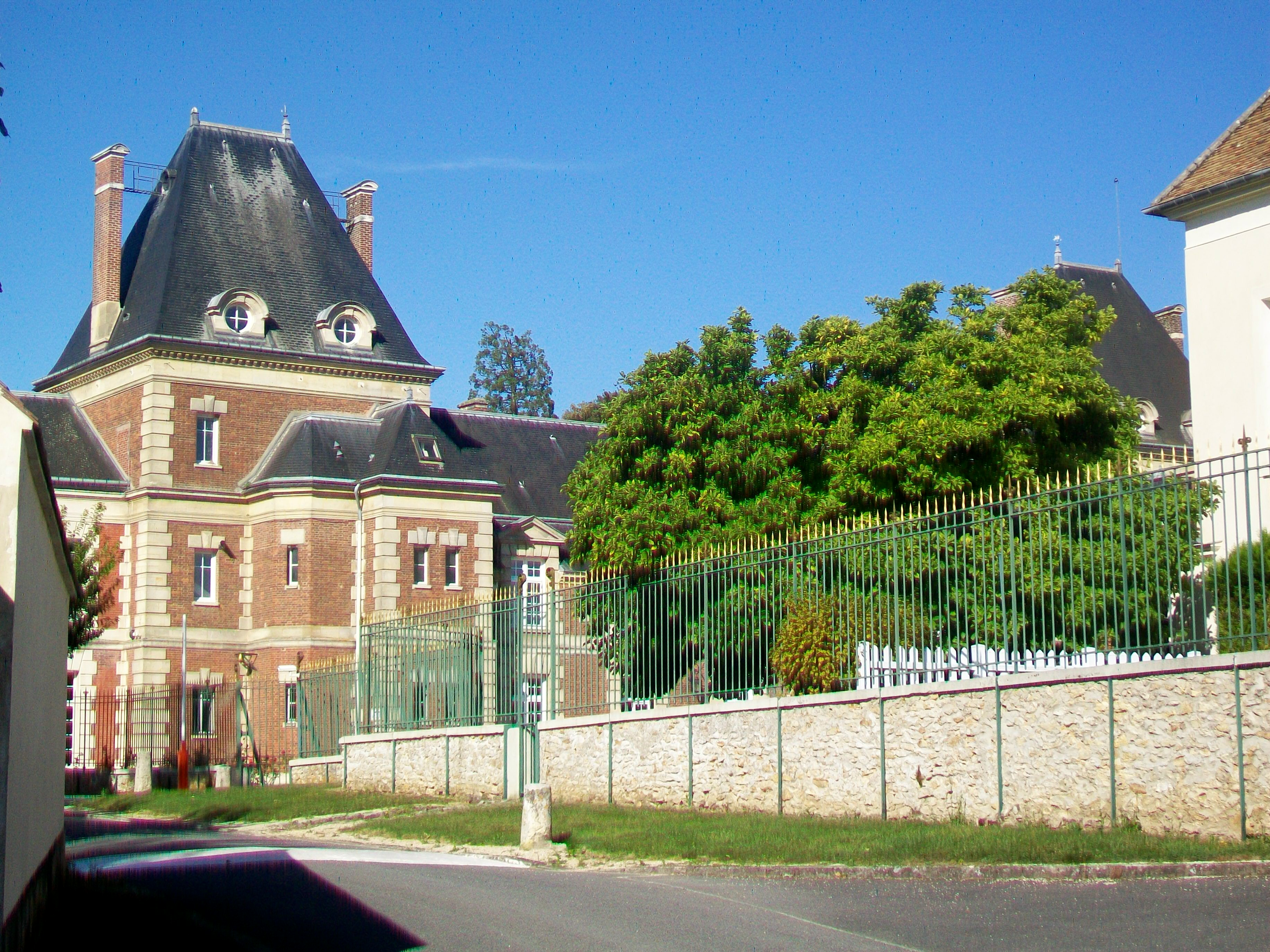 Le château (« Domaine des gueules cassés »), vue partielle de la façade est. Le chemin visible sur la photo n'est pas accessible au public, la photo étant prise depuis la première grille de la rue du colonel-Picot.